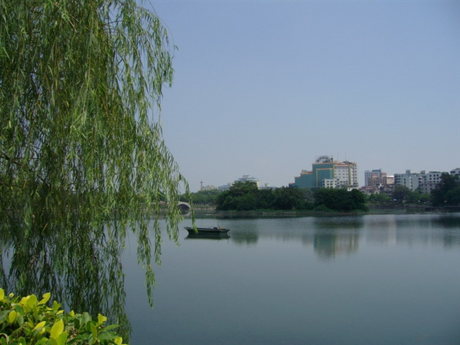 中文（中国大陆）: 惠州西湖之南湖